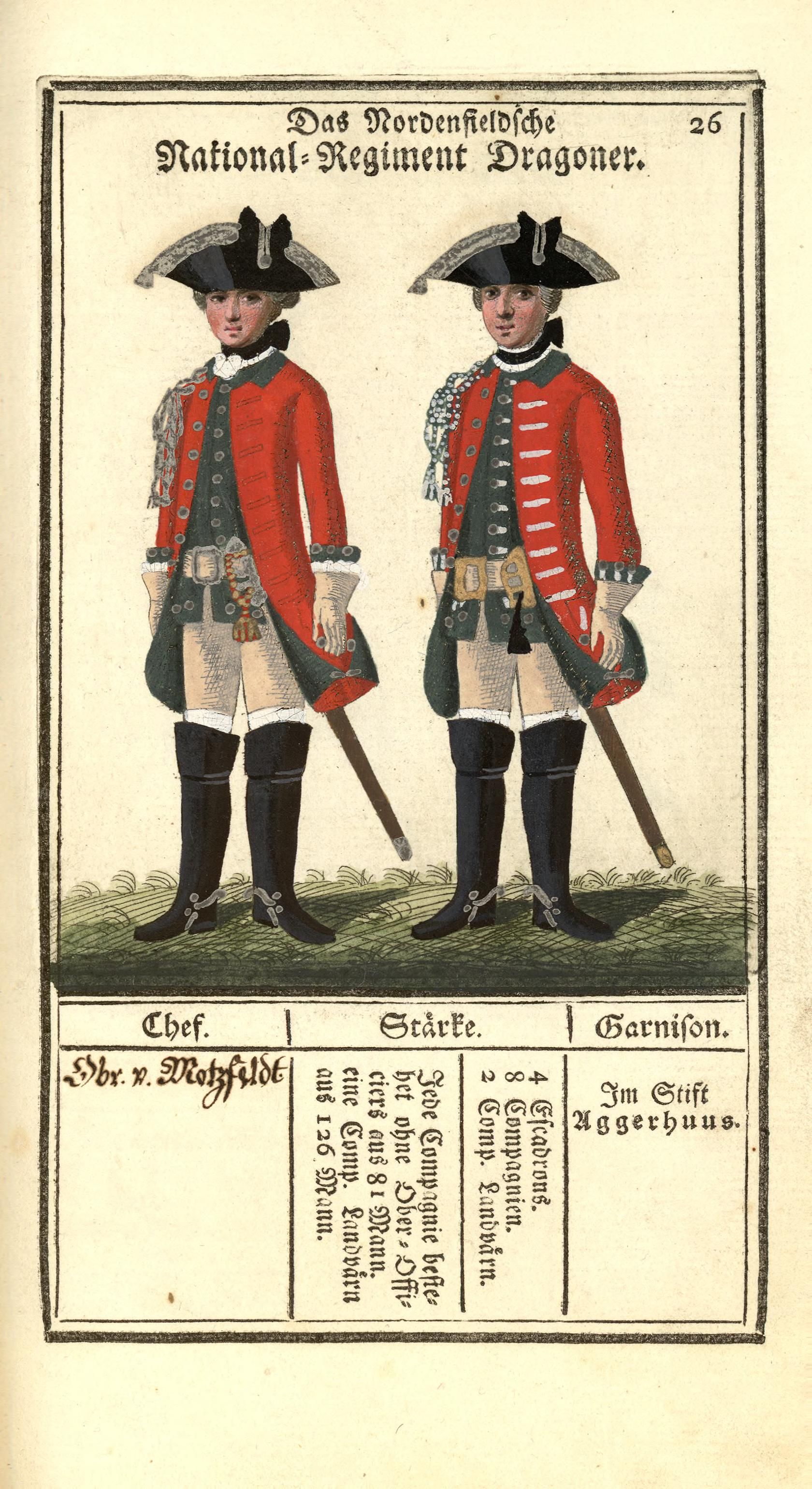 Illustrasjon hentet fra boken "Vorstellung der sämtlichen Königl. Dänischen Armee" av Bertram, Carl og utgitt av Carl Bertram (dk, 1763)